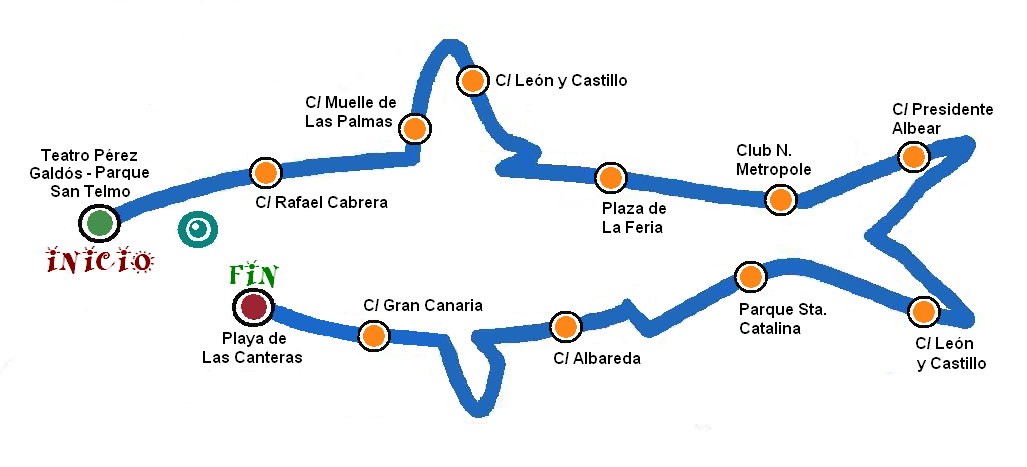 Dibujo del recorrido del Entierro de la Saridina en la ciudad de Las Palmas de Gran Canaria, (España).